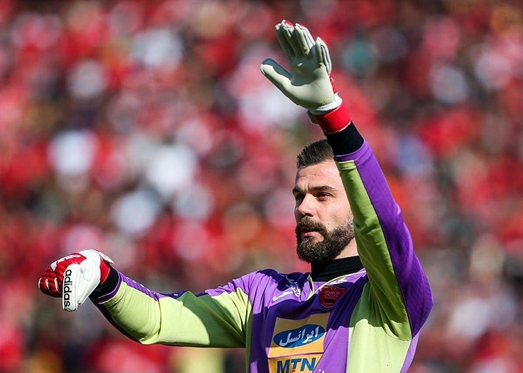 تصاویر تسنیم از شهرآورد هشتاد و ششم تهران - بوژیدار رادوشویچ